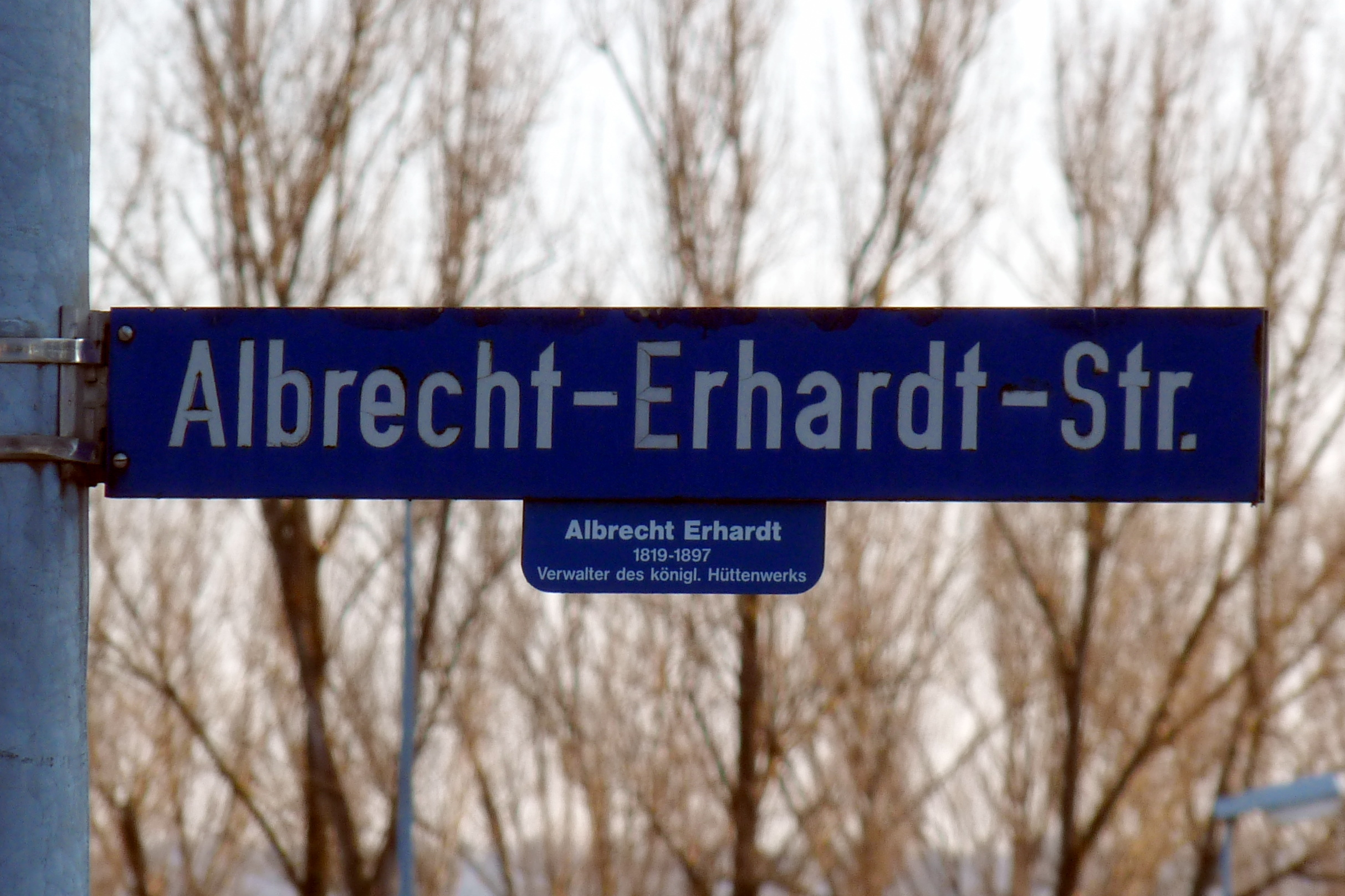 Nach Albrecht Erhardt benannte Straße in Aalen